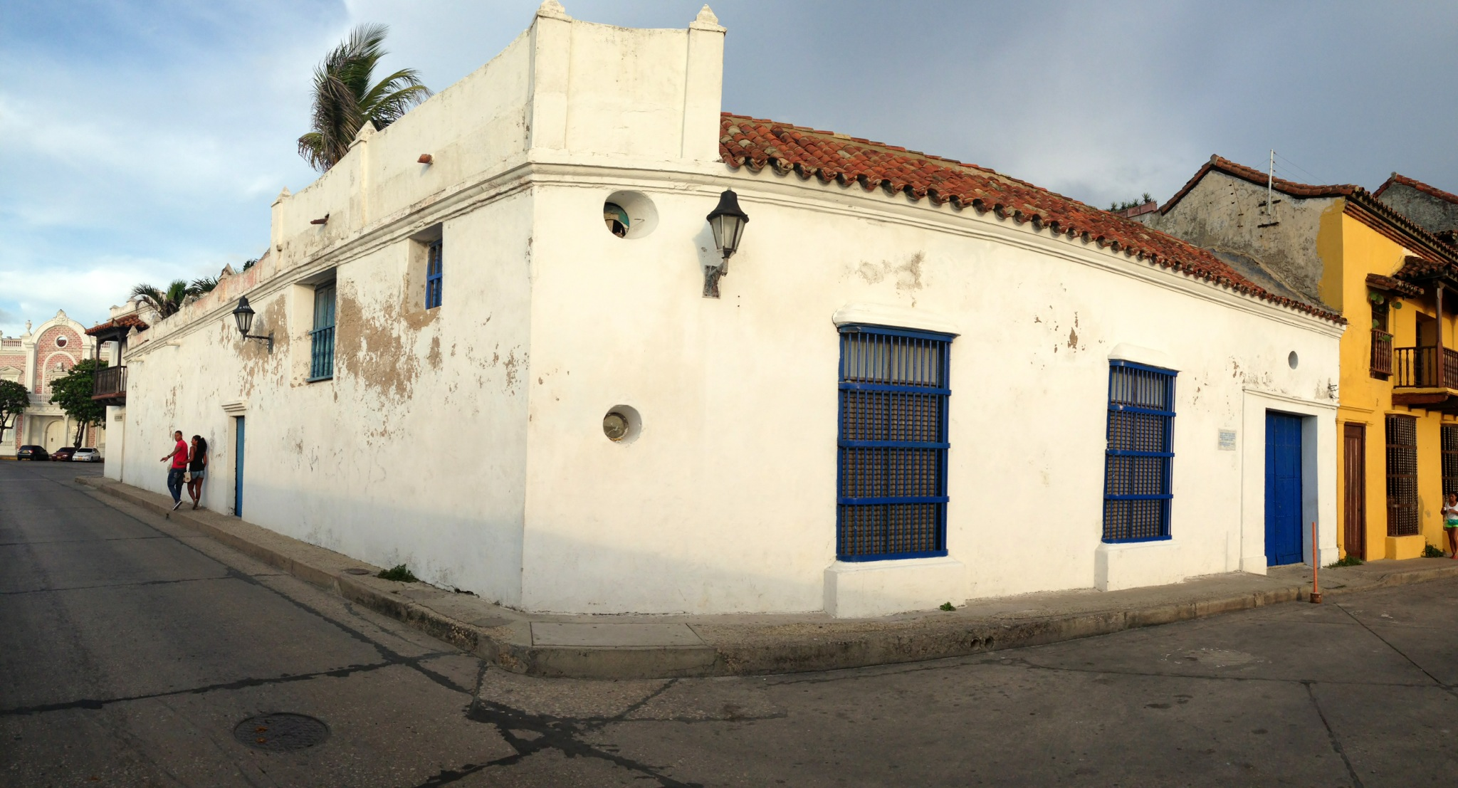 Casa del Maestro Alejandro Obregón